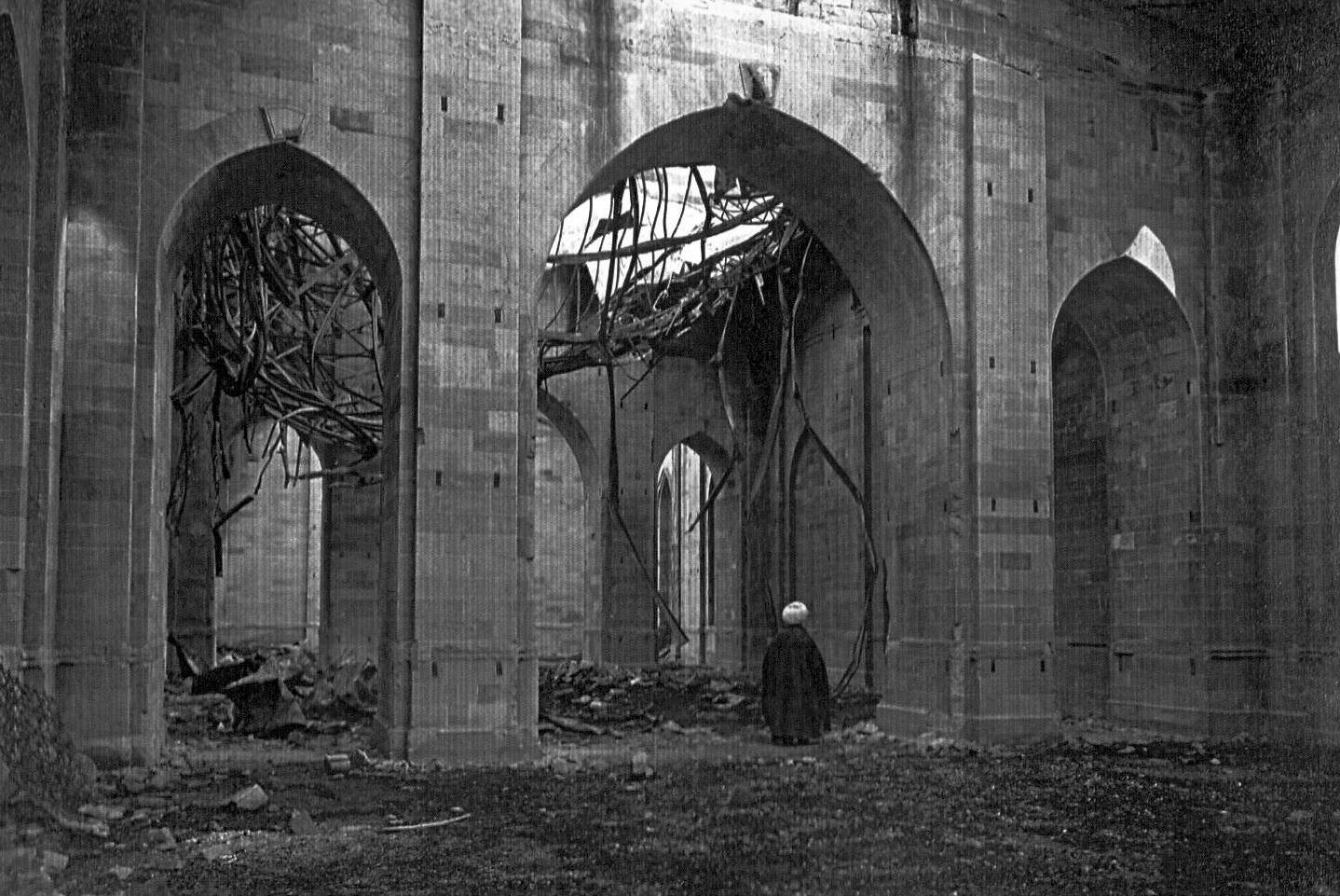 Cümə məscidinin interyer görünüşü 1918-ci ildə ermənilər tərəfindən törədilmiş yanğından sonra, məscidin qabağında Axund Hacı Şıx Həbib